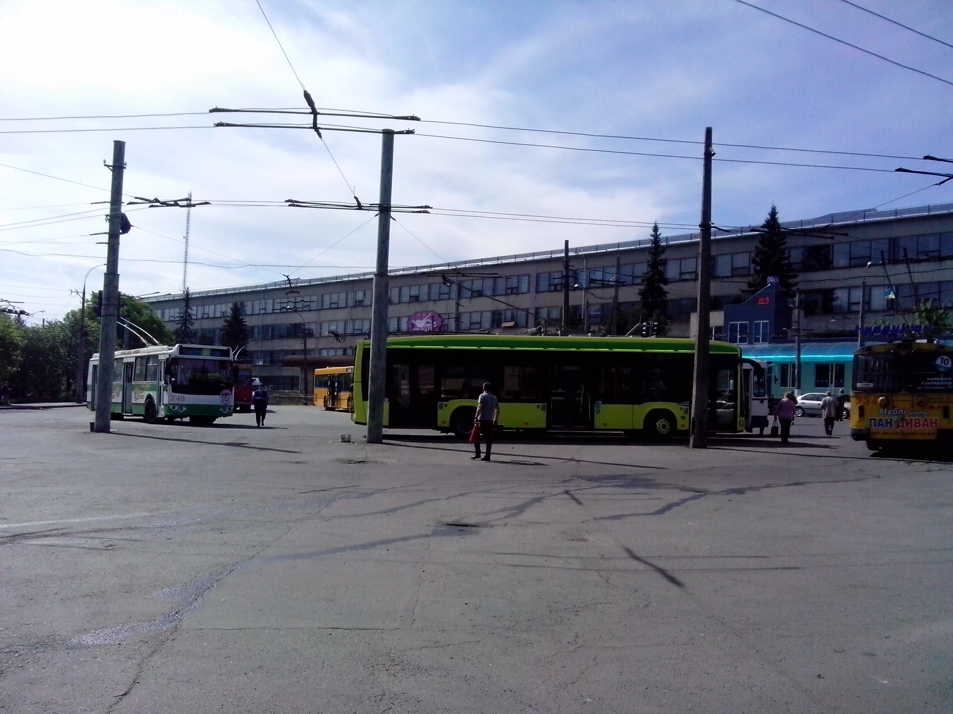 львовский тролейбус электрон припарковался